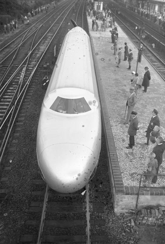 Der Schienenzeppelin, der Propellerwagen des deutschen Ing. Kruckenberg, rast mit 230 km Stundengeschwindigkeit von Hamburg nach Berlin. Der Schienenzeppelin verlässt nach seiner Ankunft in Berlin den Spandauer Hauptbahnhof.